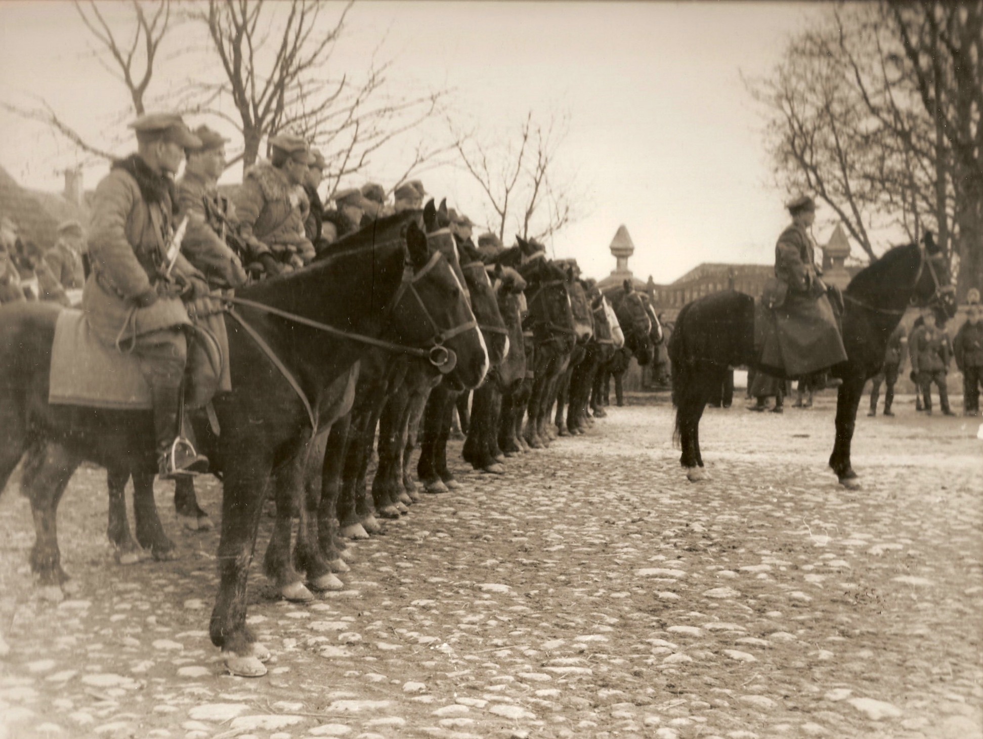 Turgiele 1944. 3 Wileńska Brygada AK